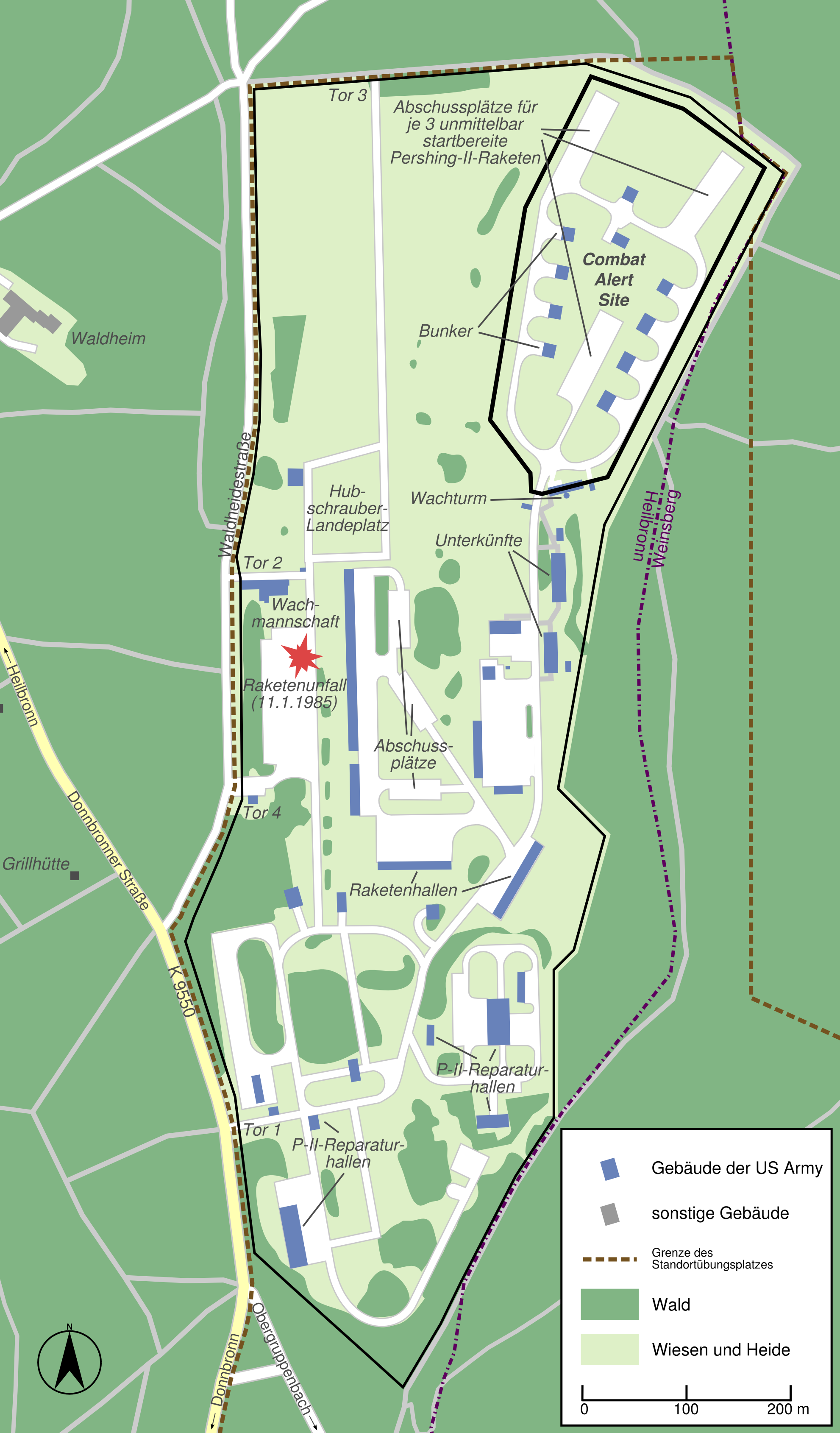 Karte der Heilbronner Waldheide während der Pershing-II-Stationierung (um 1985).